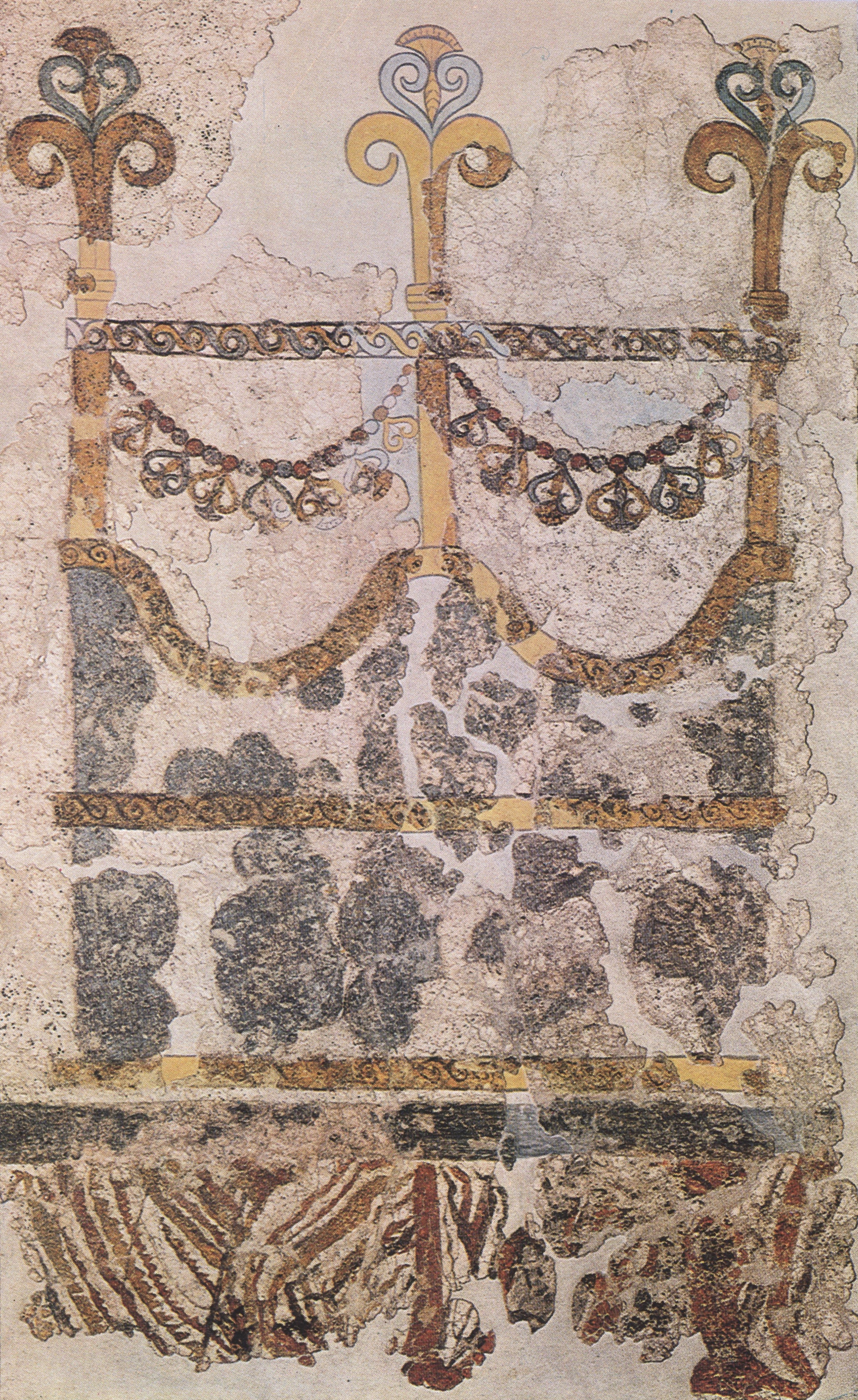 Darstellung einer Kapitänskajüte auf einem Fresko aus Raum 4 im Obergeschoss des Westhauses der Ausgrabungsstätte in Akrotiri auf Santorin, Kykladen, Griechenland